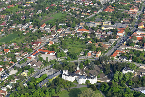 Martonvásár látképe madártávlatból